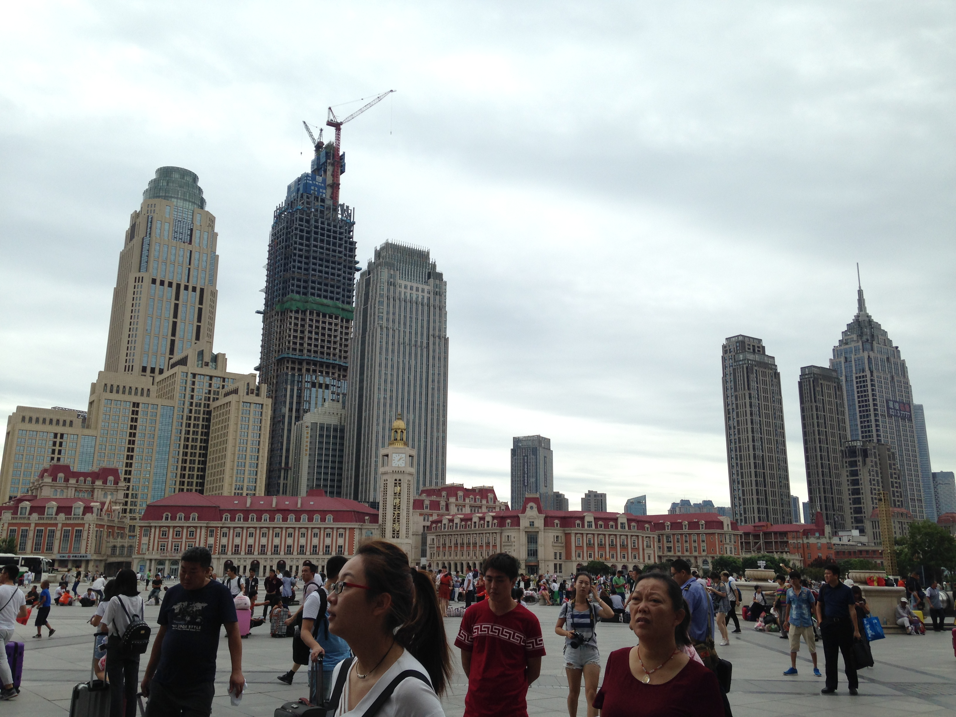 天津駅前の風景